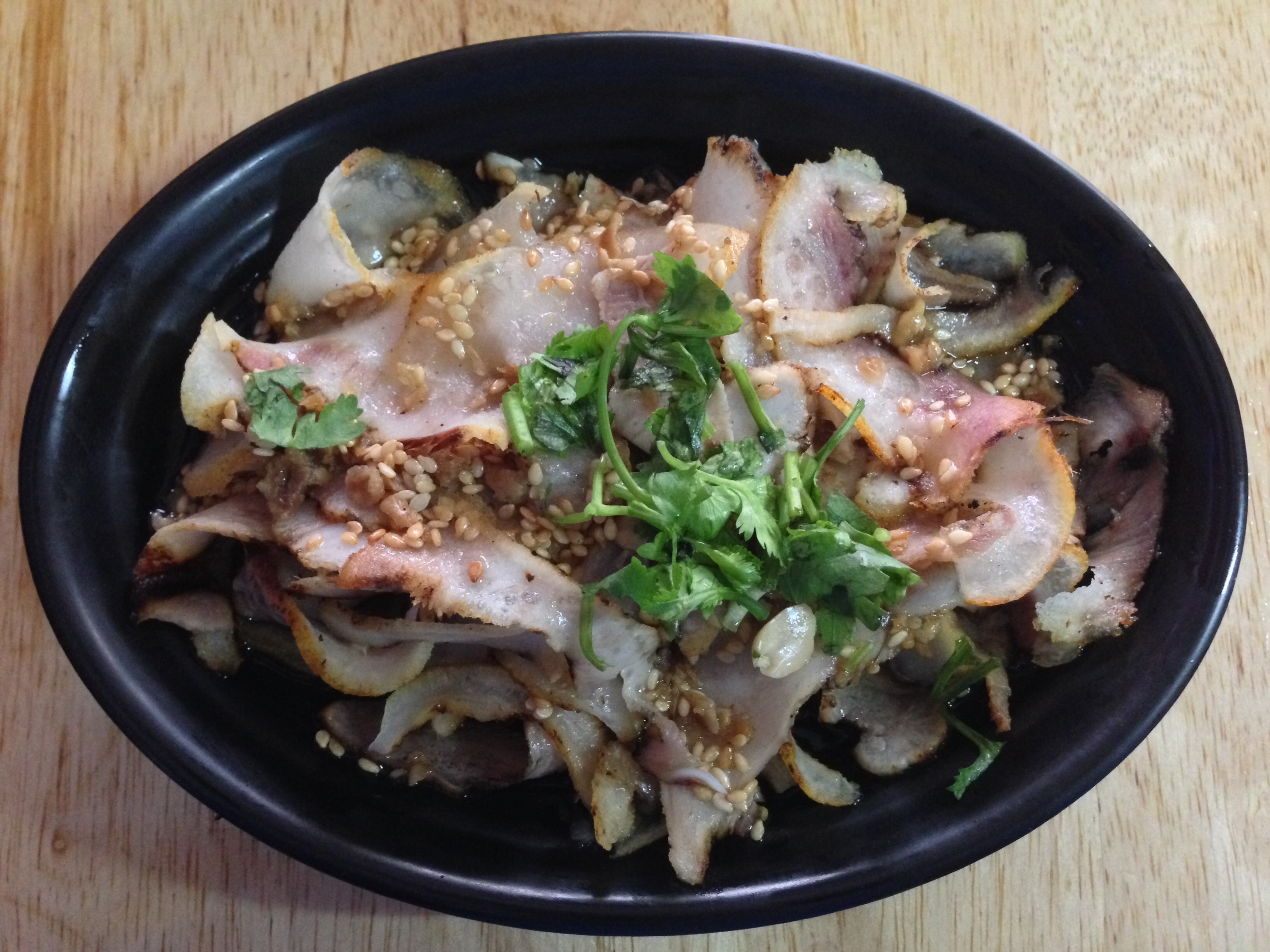 中文（台灣）: 國旗屋涼拌火燒